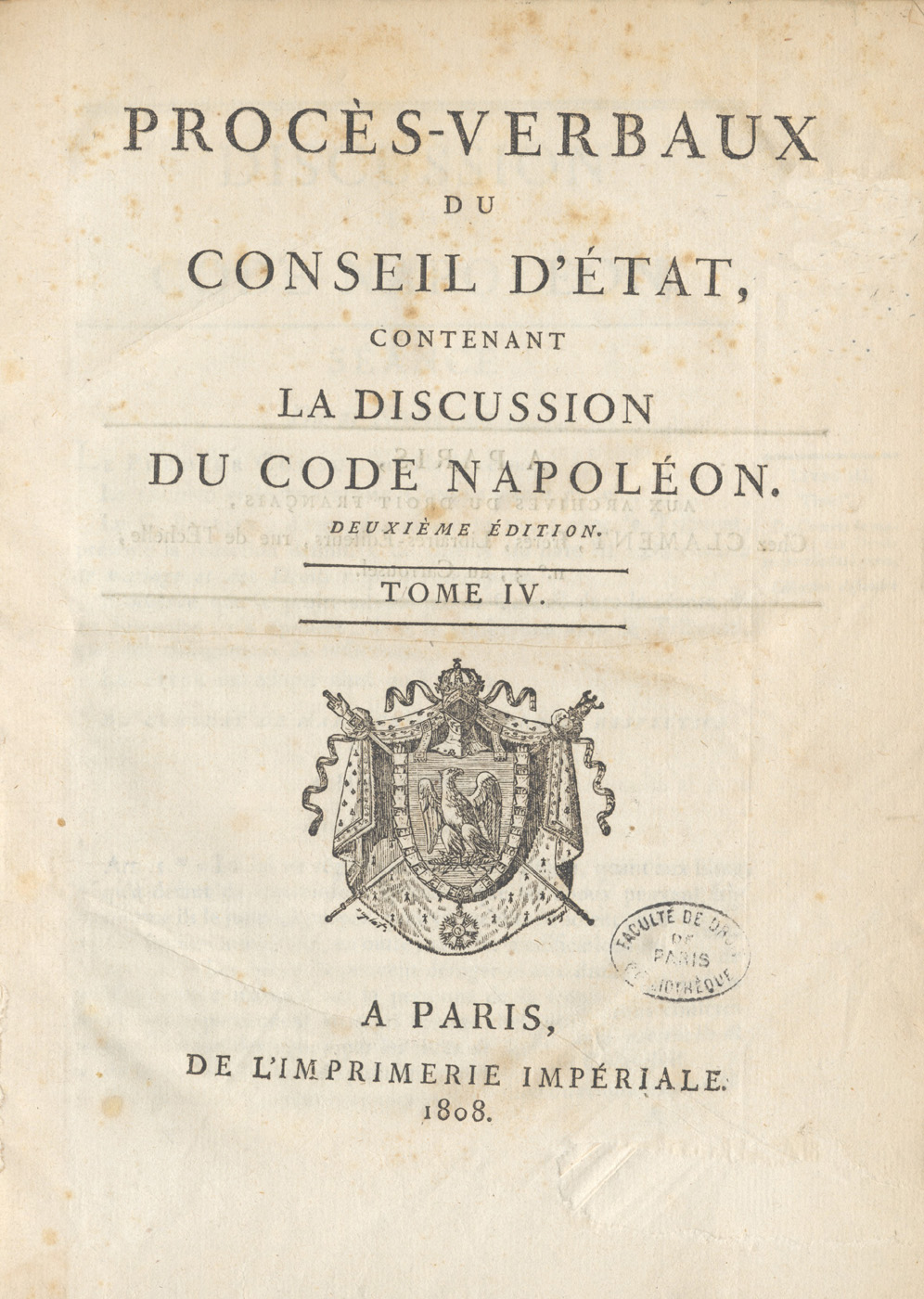 Procès-verbaux du Conseil d'Etat, contenant la discussion du Code Napoléon. Deuxième édition